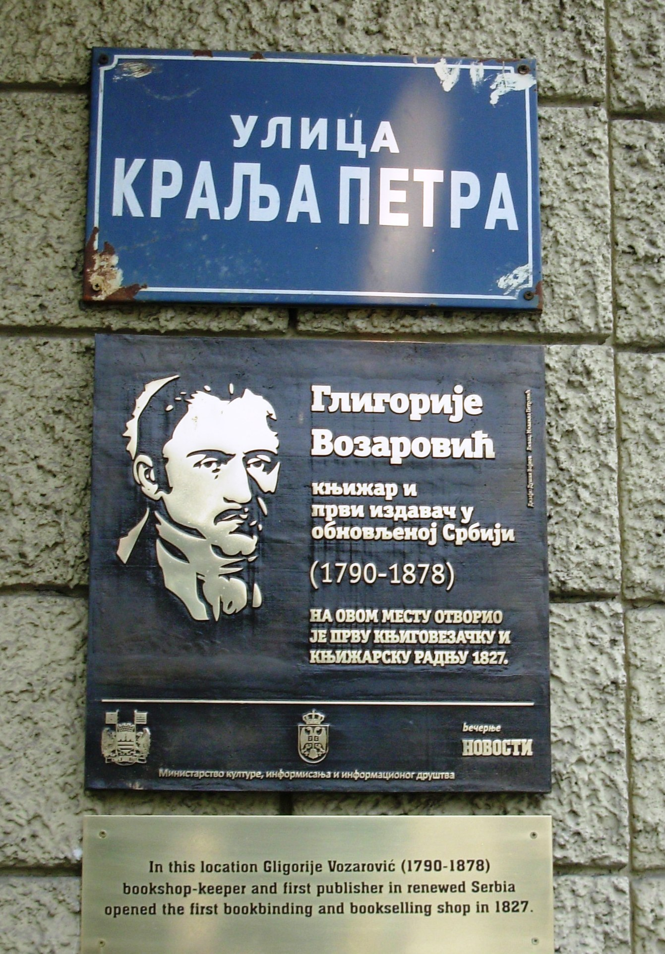 Tabla u ulici kralja Petra I, odmah pored kafane "?".